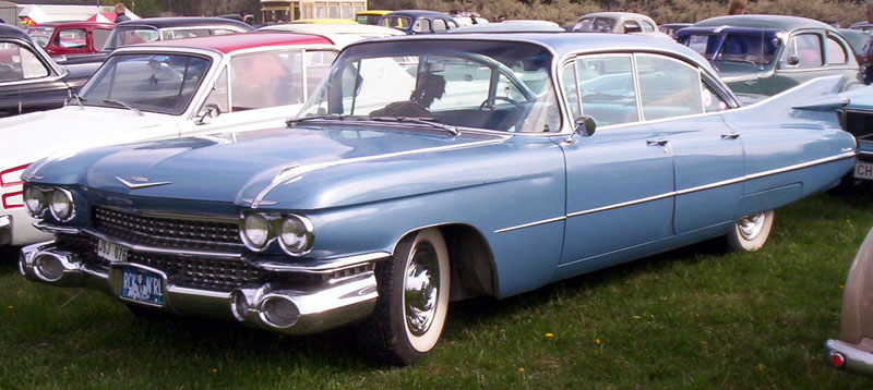 1959 Cadillac Series 59-63 Sedan DeVille